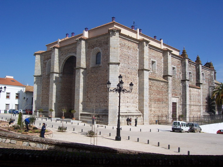 Fachada delantera (obra de nueva construccion)